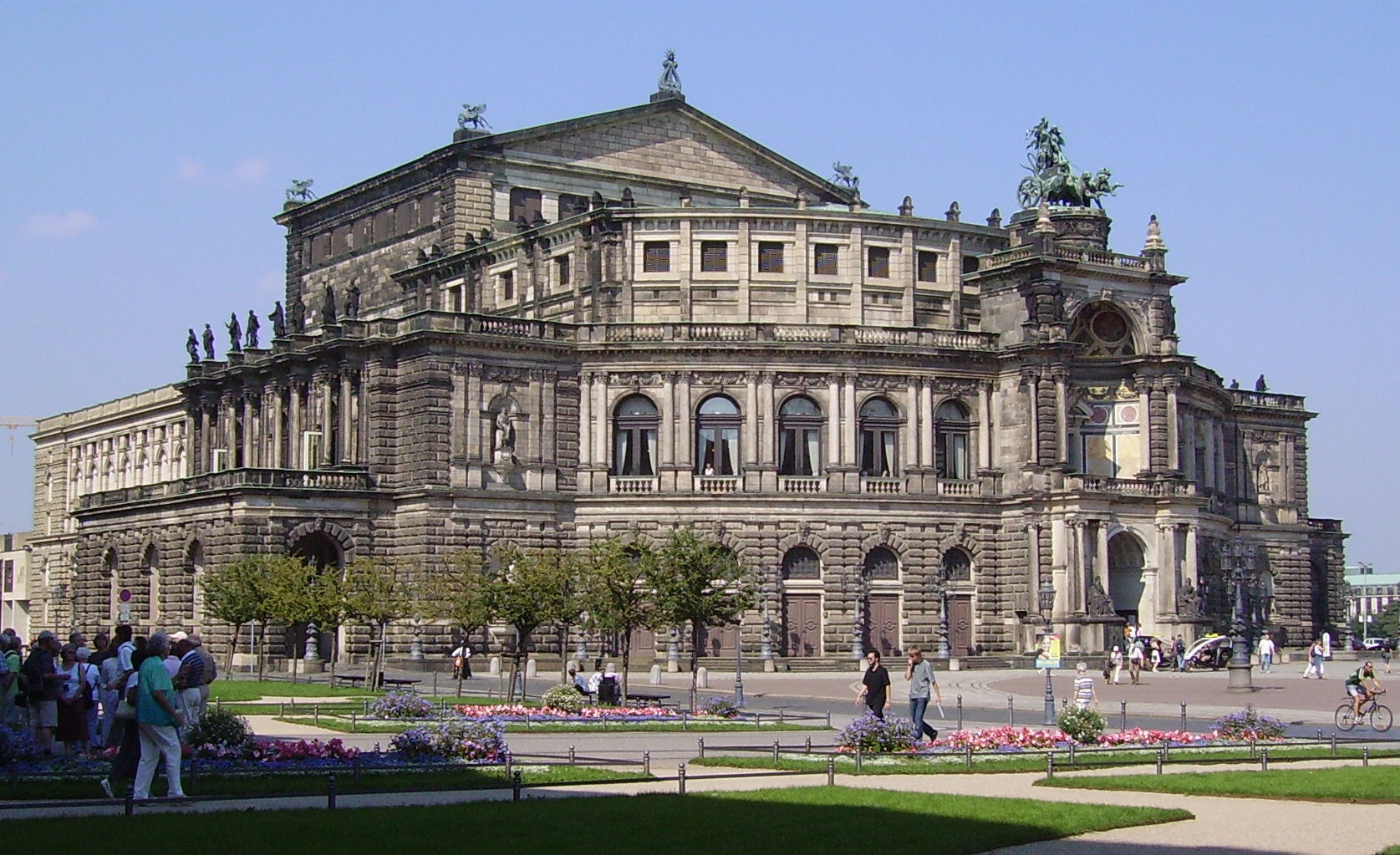 Semperoper in Dresden, Germany